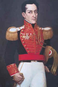 Mariscal Domingo Nieto y Márquez